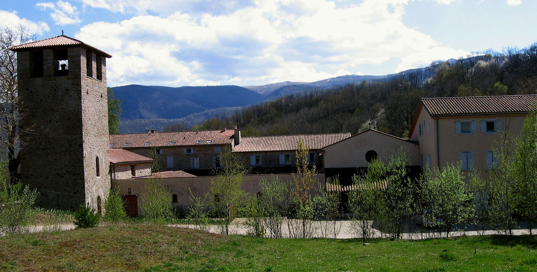 Abbaye bénédictine Notre Dame du Pesquié à Serres-sur-Arget (Ariège, France).